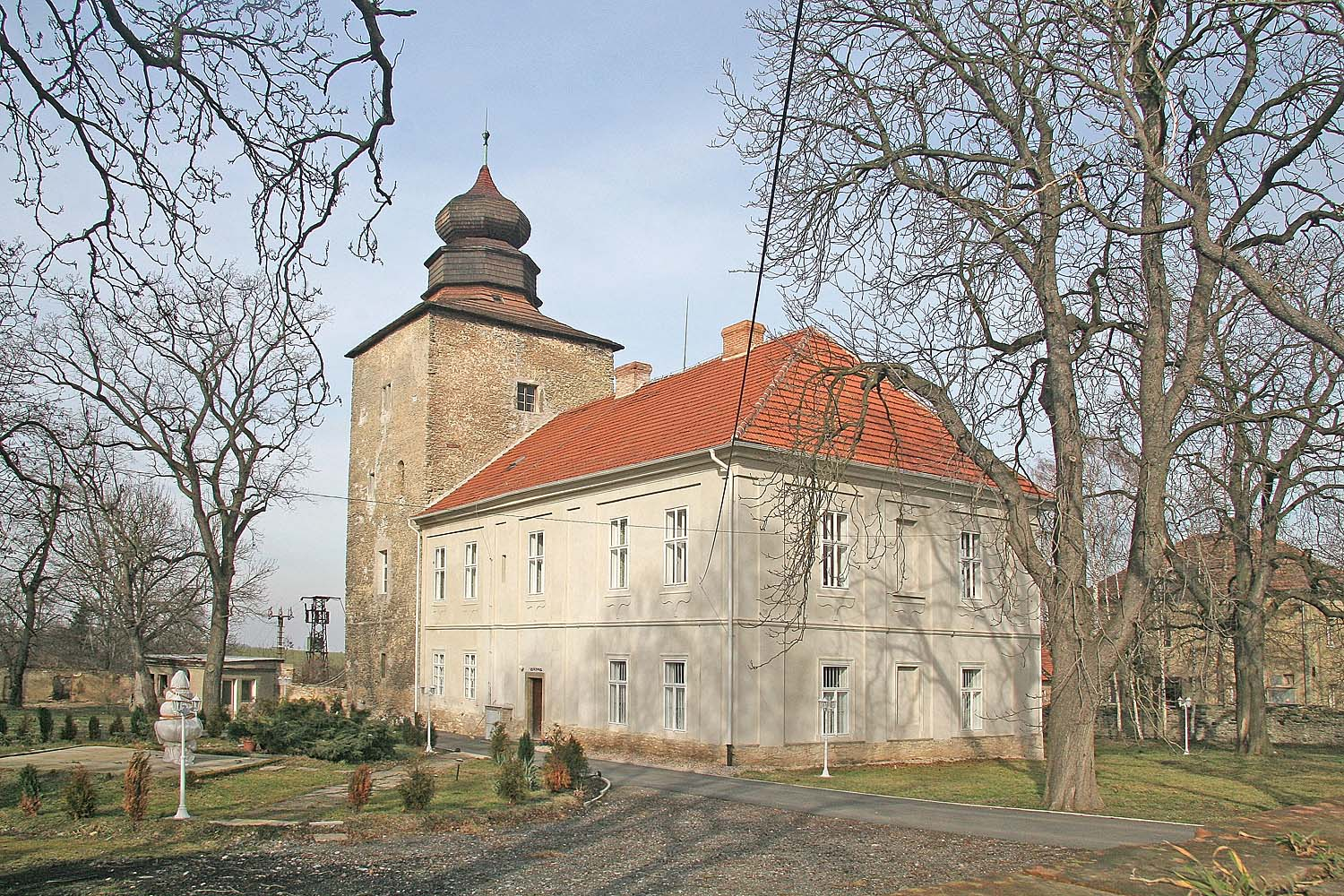 Pašinka - tvrz v obci, district Kolín autor: Prazak date: 5. 2. 2007